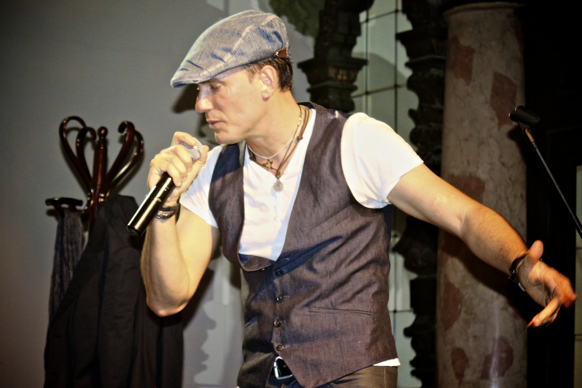 Foto del artista durante su actuación(julio 2012) en la sal Casino de Sevilla